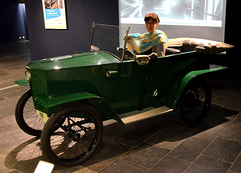 Zur Eröffnung der Ausstellung Hannover aufgeladen! - Elektromobilität zwischen Wunsch und Wirklichkeit vom 10. Februar bis zum 14. Juni 2015 im Historischen Museum Hannover posierte die für den Hannover-Teil zuständige Co-Kuratorin Kathleen Biercamp in einem fahrtüchtigen, von der Hannoverschen Waggonfabrik (HAWA) bis 1925 verkauften Hawa 40 Volt Elektro-Kleinwagen, der seinerzeit sowohl als offener wie auch geschlossener Tandem-Zweisitzer mit vier Rädern geliefert wurde ...